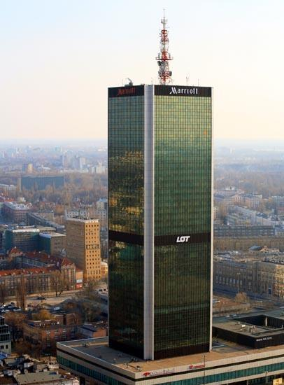 Warszawa (Polska)